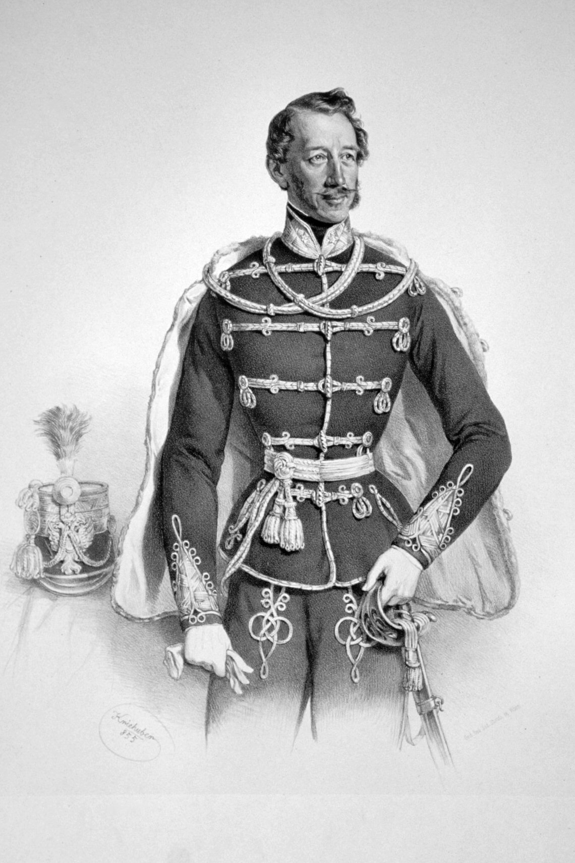 Alexander Török Graf von Szendrö (1809-1868), k. k. Offizier, zuletzt Feldmarschallleutnant. Lithographie von Josef Kriehuber, 1855